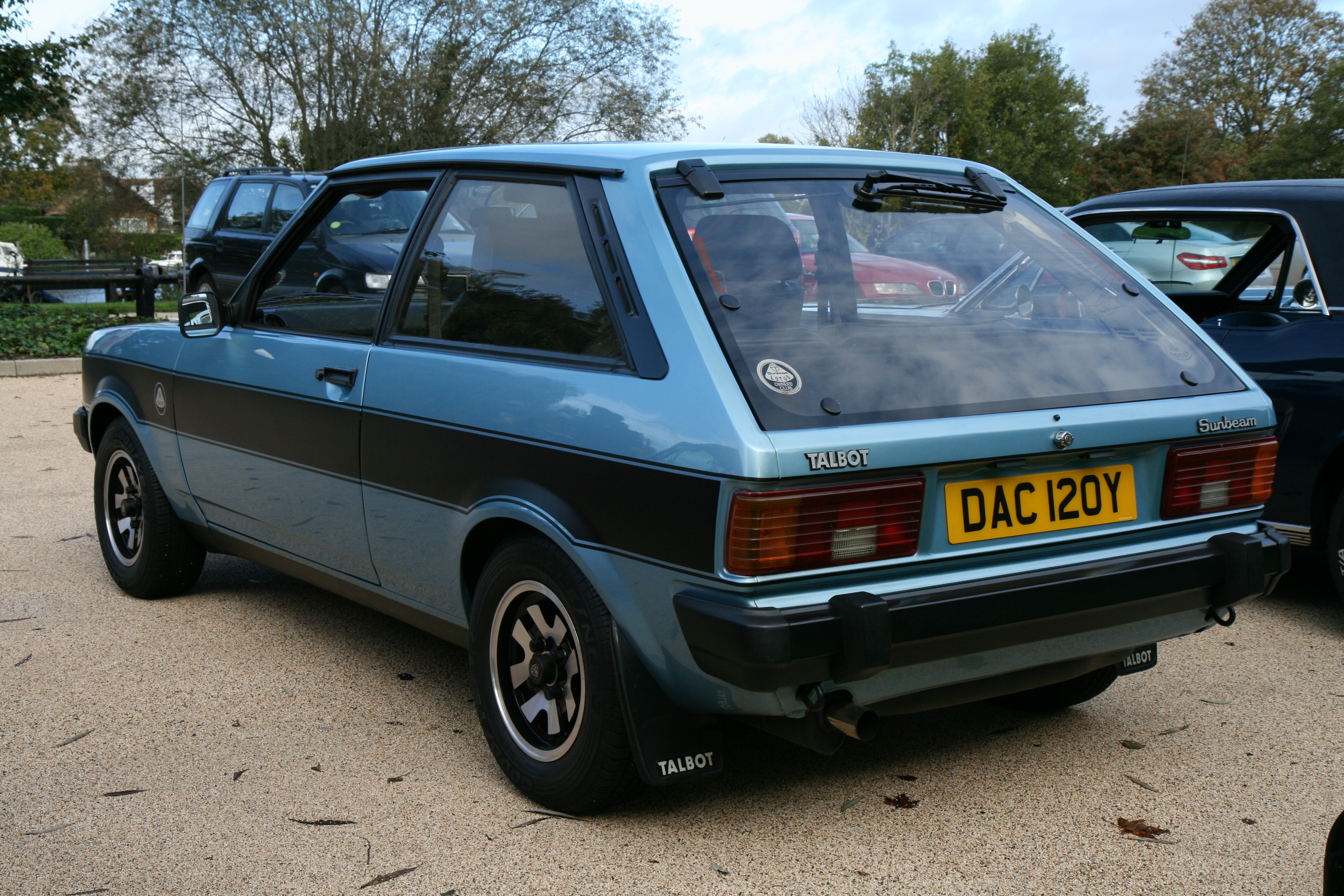 1983 Talbot Sunbeam Lotus